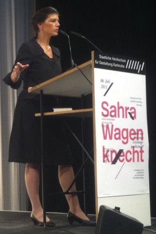 Sahra Wagenknecht bei ihrem Vortrag mit dem Titel „Leben wir in einer Leistungsgesellschaft?“ an der Hochschule für Gestaltung Karlsruhe